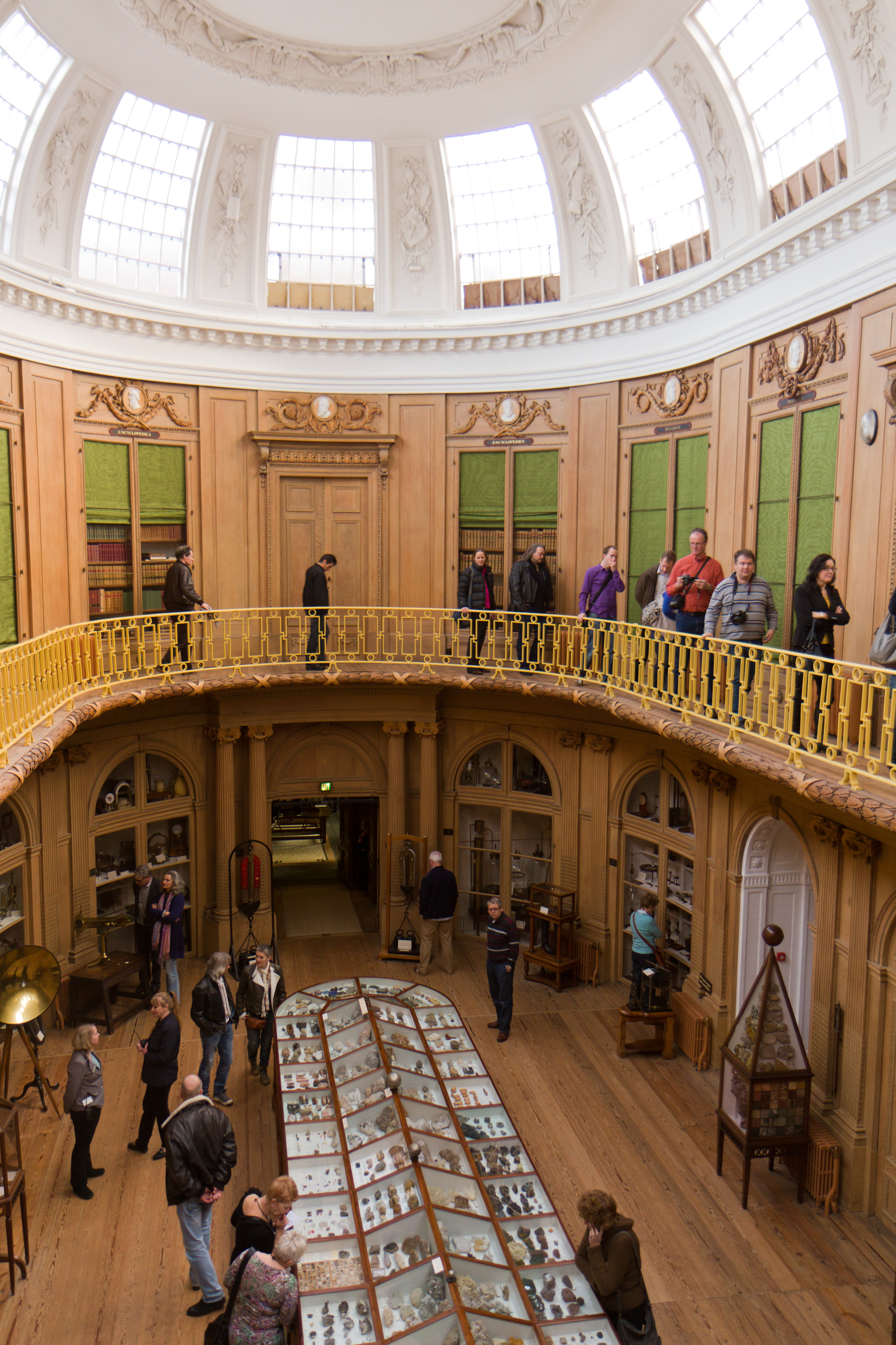 Rondleiding in Teylers Museum, nieuwjaarsreceptie Wikimedia NL 2012